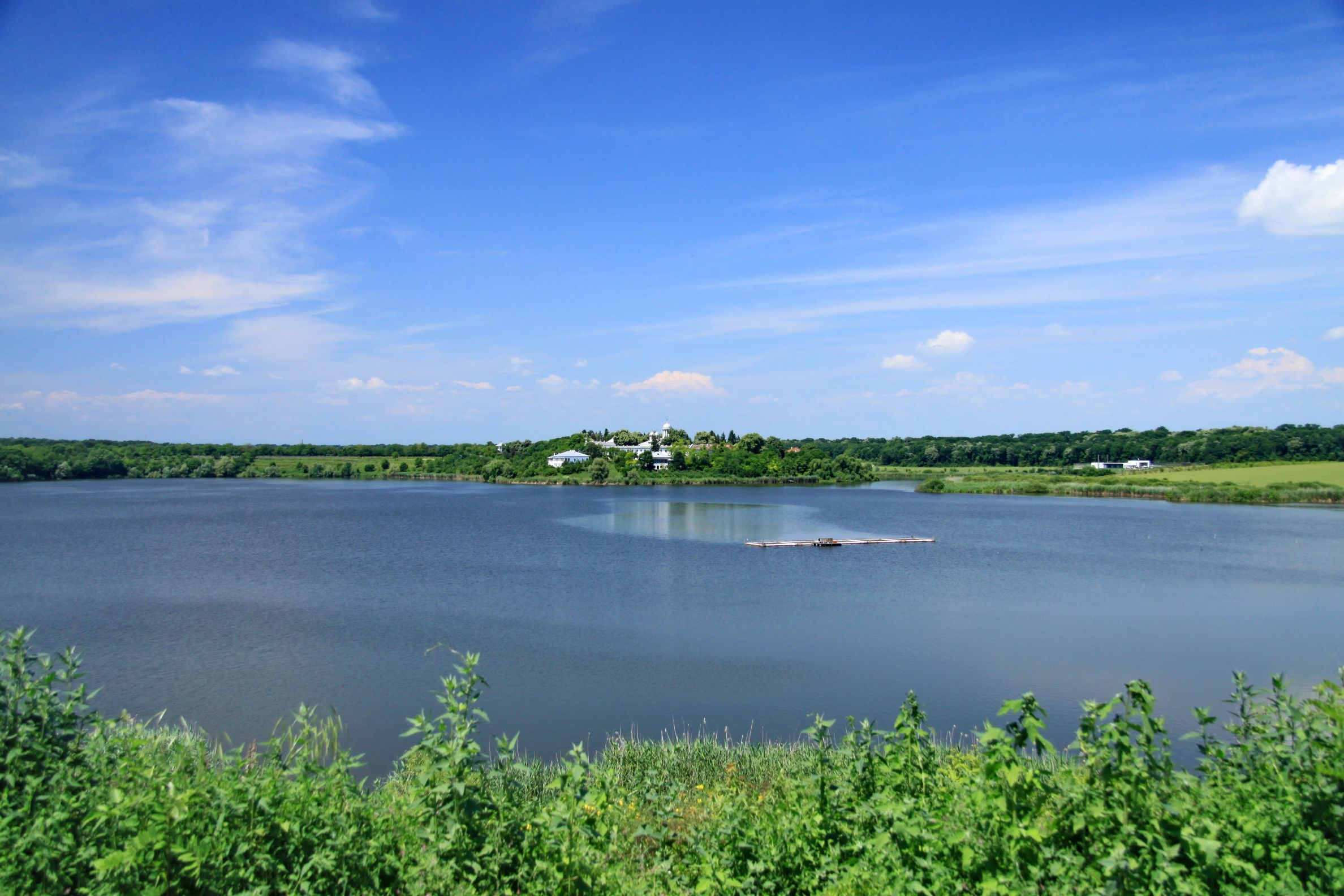 Mânăstirea Căldărușani - vedere generală de peste lac. Comuna Gruiu, Ilfov